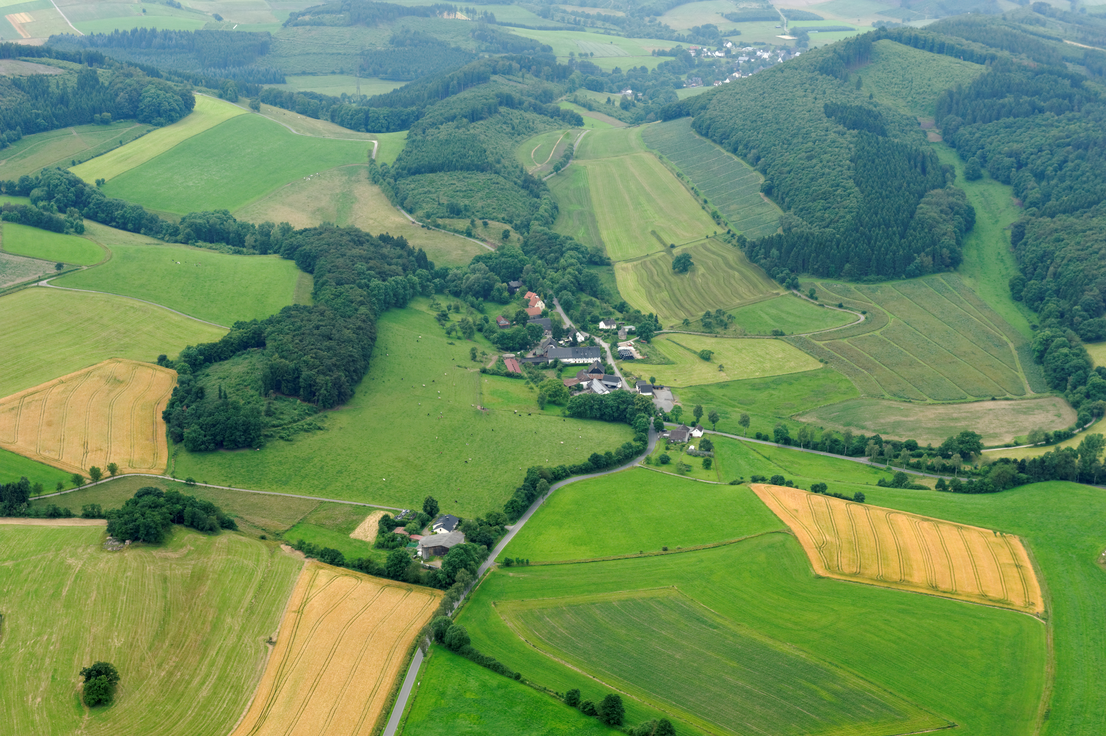 Fotoflug Sauerland Nord. Sundern (Sauerland). Weninghausen und im Hintergrund Recklinghausen